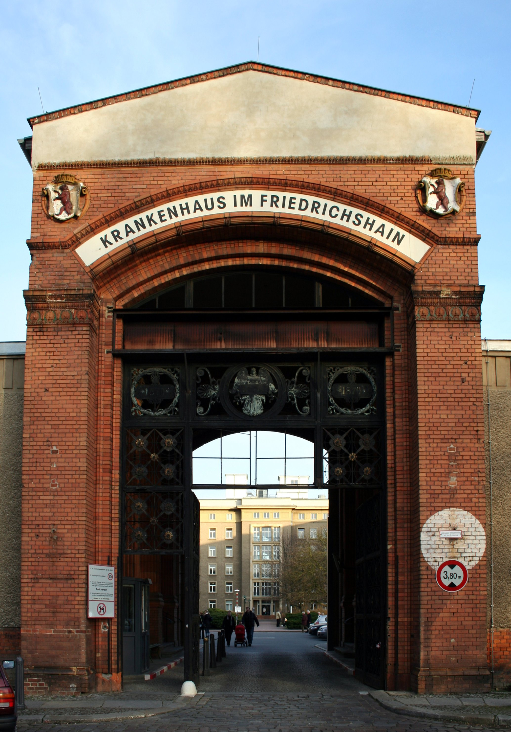 Historisches Eingangs- und Einfahrtstor des Krankenhauses im Friedrichshain, Berlin.